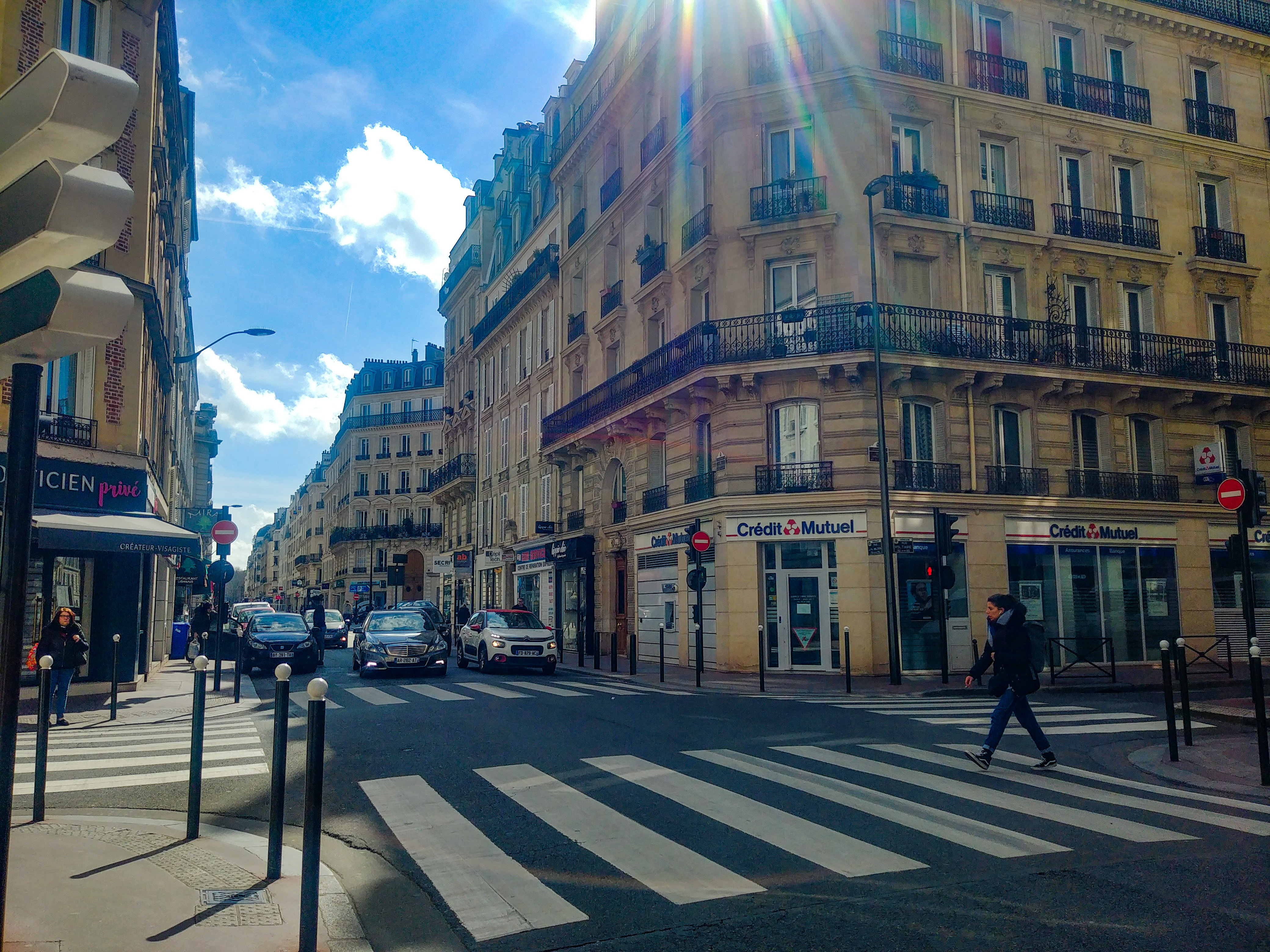 Rue du Président-Wilson (anciennement rue de Courcelles) à Levallois-Perret